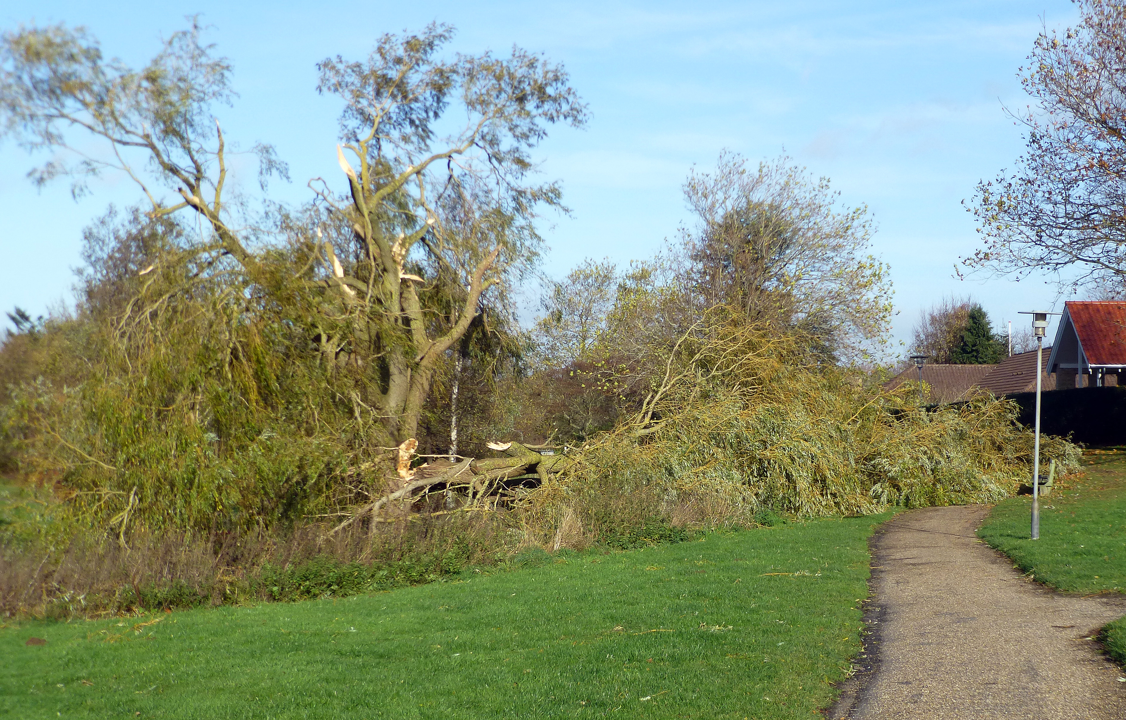 Stormskadet træ i Beder syd for Århus